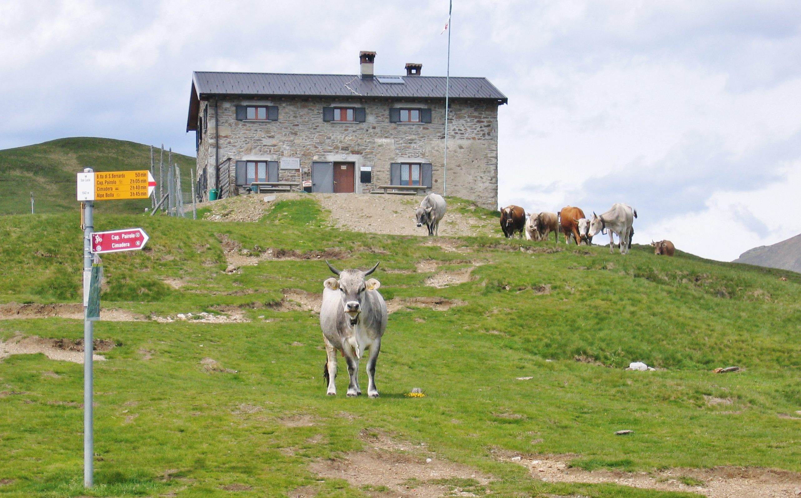 San Lucio